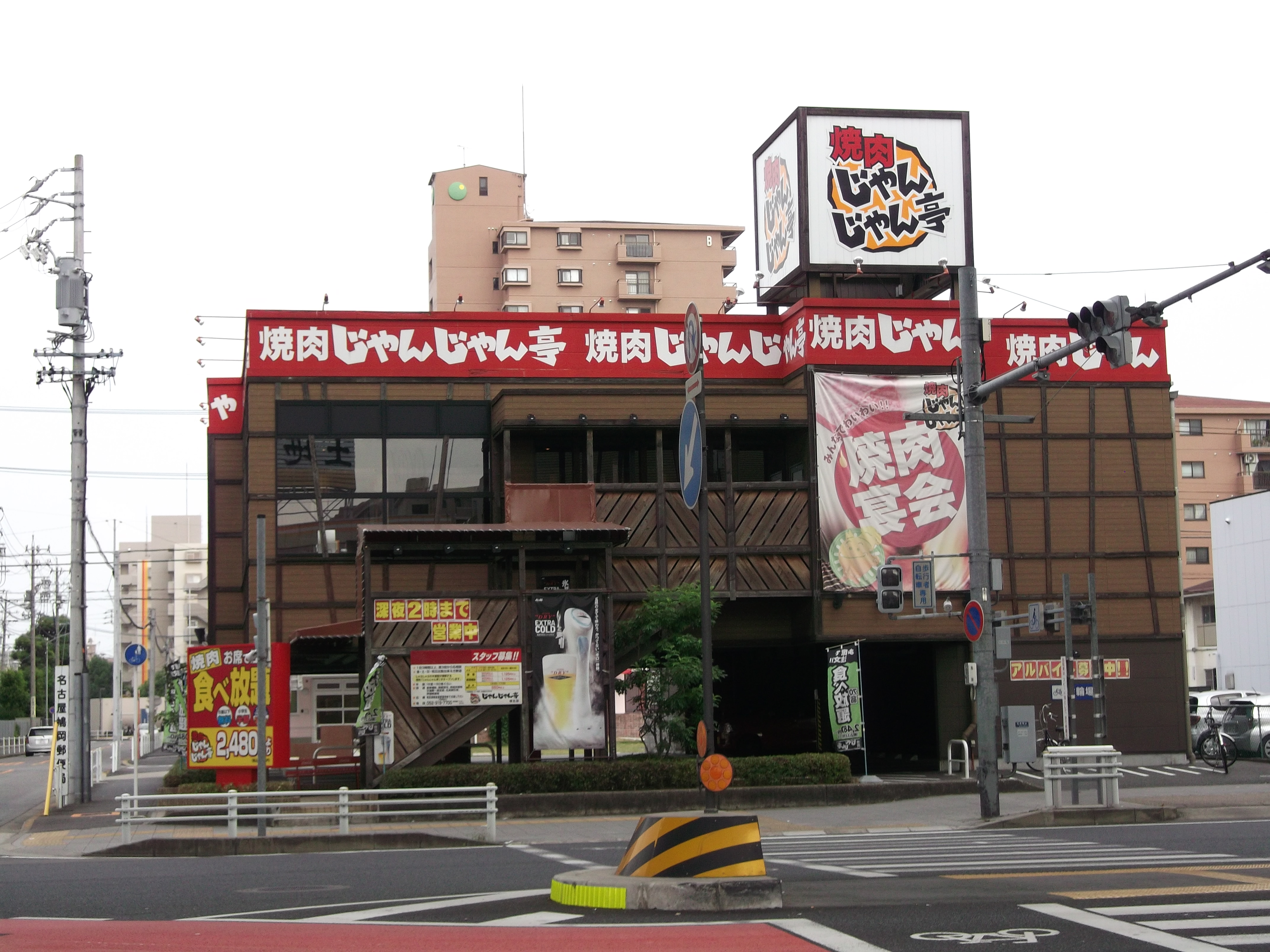 名古屋市北区萩野通の焼肉じゃんじゃん亭を西側公道より撮影